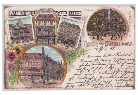 1905 wurde das Gebäude abgebrochen und mit anderen benachbarten Gebäuden an der Bolkerstraße 17, Flinger Straße 20 und Marktplatz nach Entwürfen des Architekten Richard Hultsch zu „einer großen Warenhausanlage mit Durchgangsverbindung zwischen Bolker- und Flingerstrasse“ umgebaut. Es hatte eine der „ersten Einkaufspassagen Düsseldorfs“.